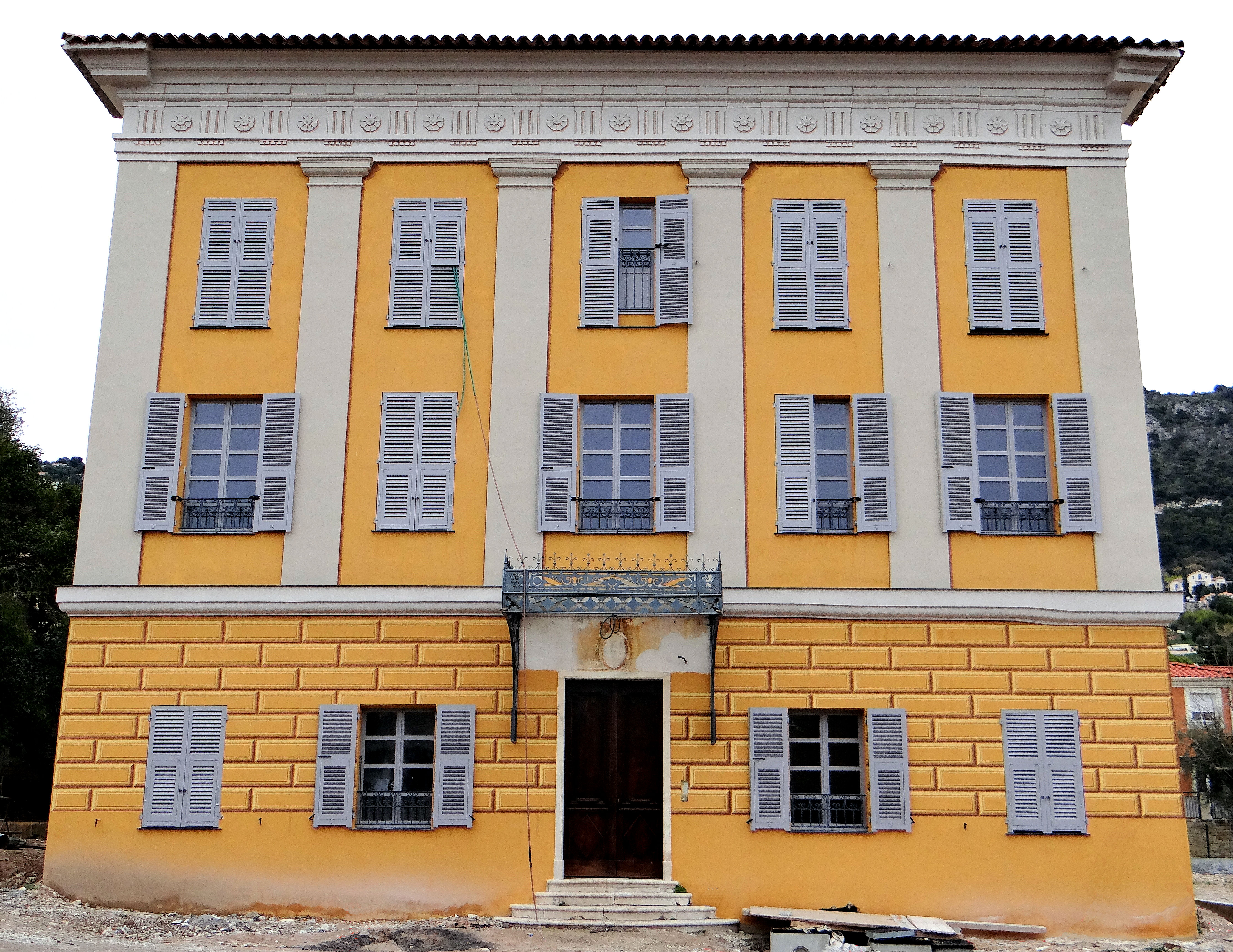 Beaulieu-sur-Mer - Villa de May - Villa en cours de restauration